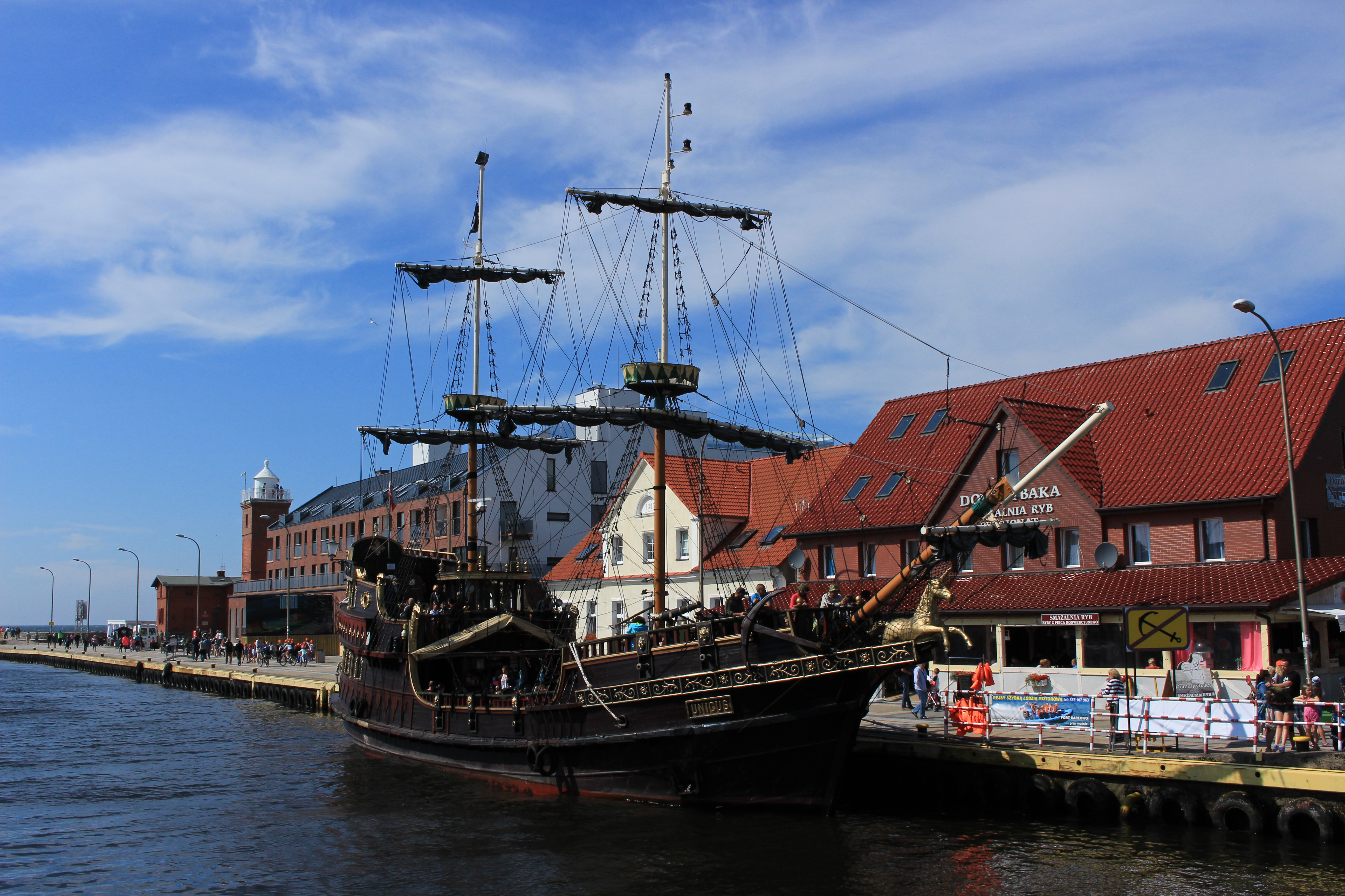 Statek Unicus w Darłówku